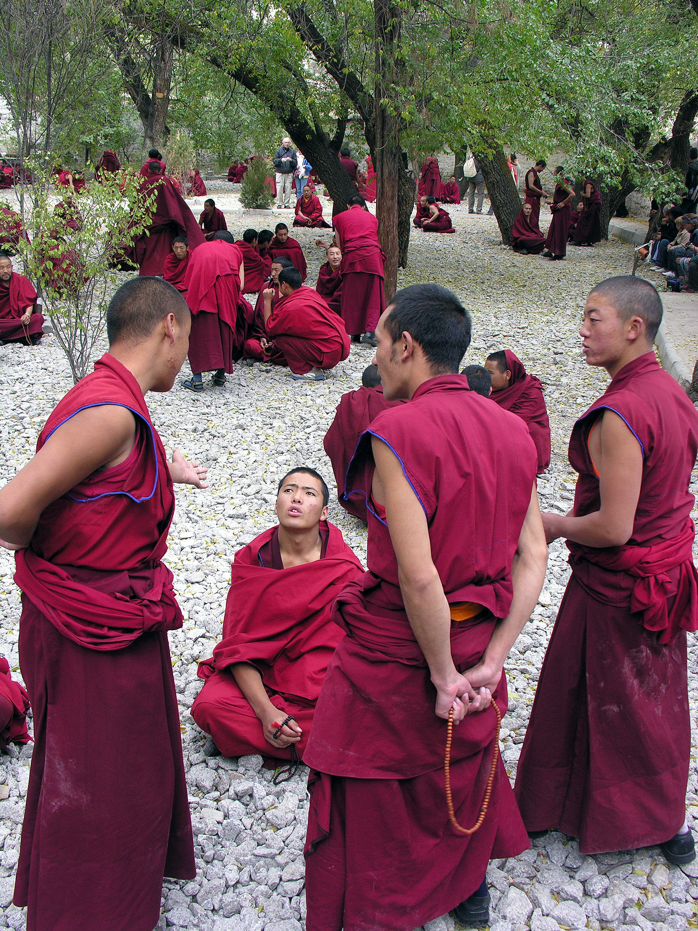 Tibet-5724